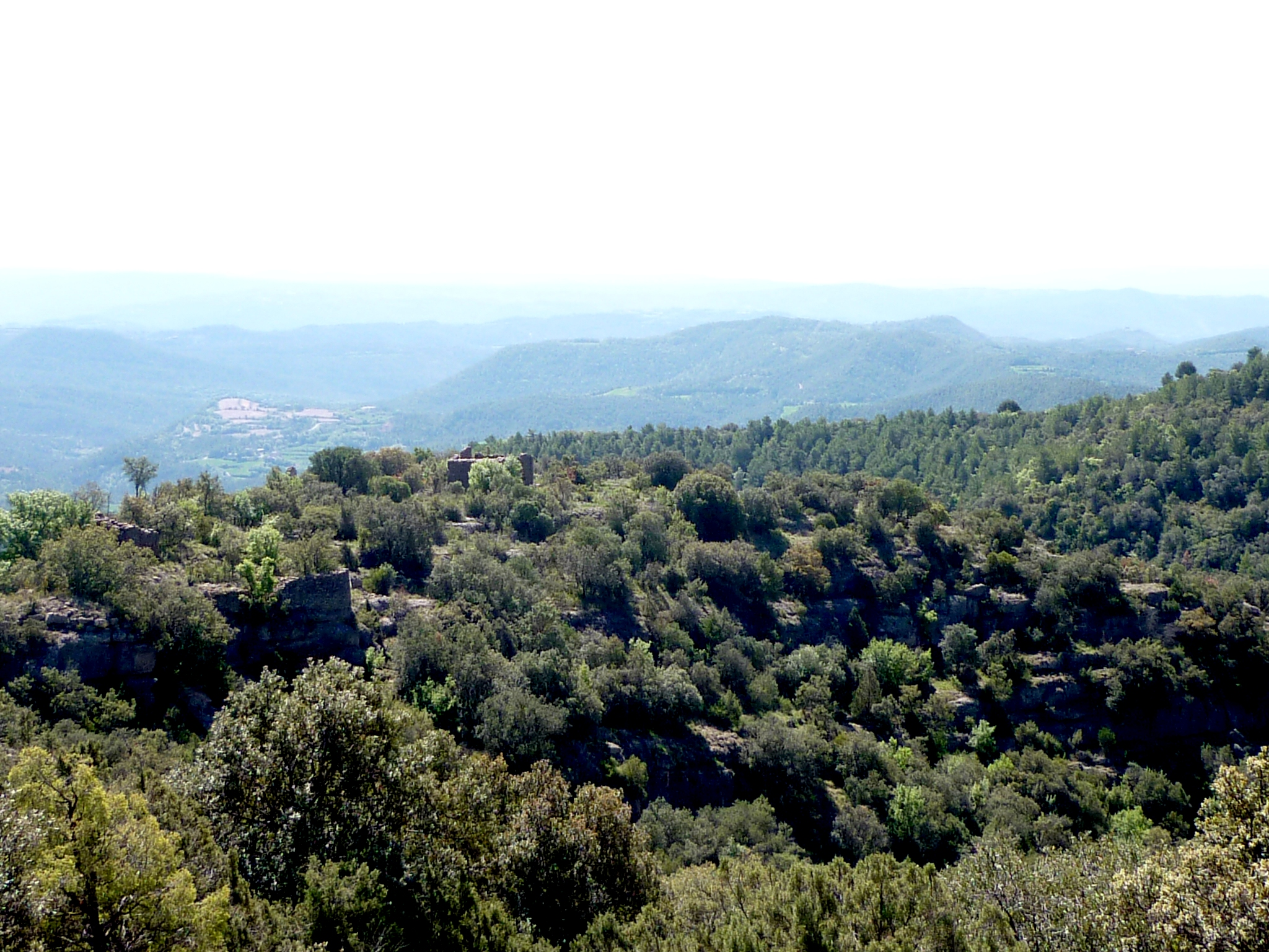 Salinoves (la Baronia de Rialb): turó amb les restes d'edificacions